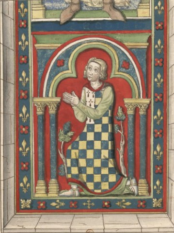 Pierre Mauclerc